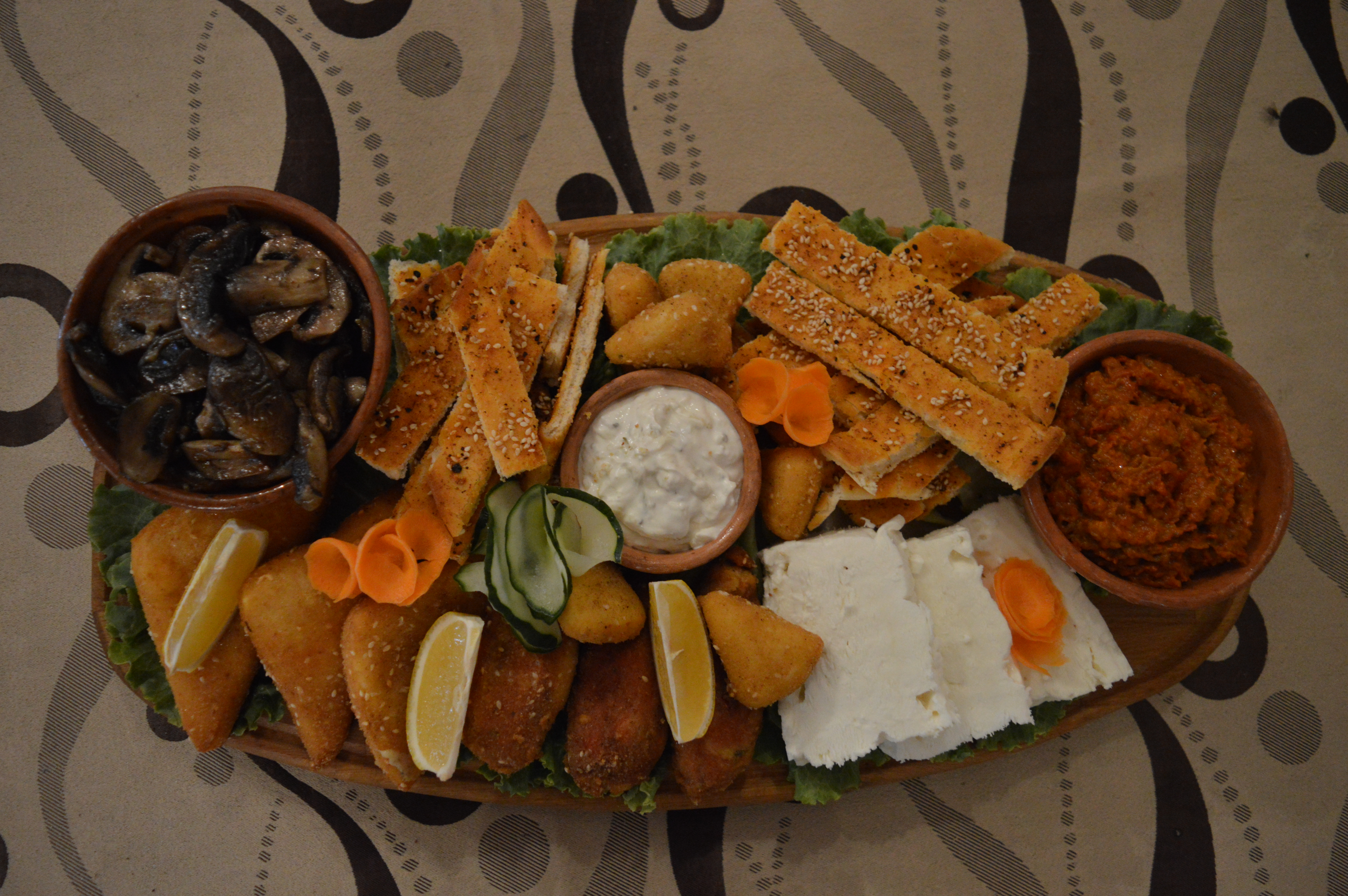 Мезе (печурки на скара, похован кашкавал, кравјо сирење, поховани пиперки, поховани зденки, фурнаринки, ајвар).